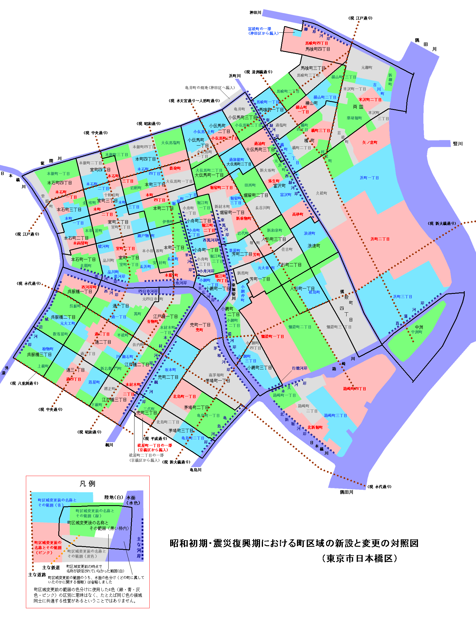 昭和初期・震災復興期における町区域の新設と変更の対照図東京市日本橋区